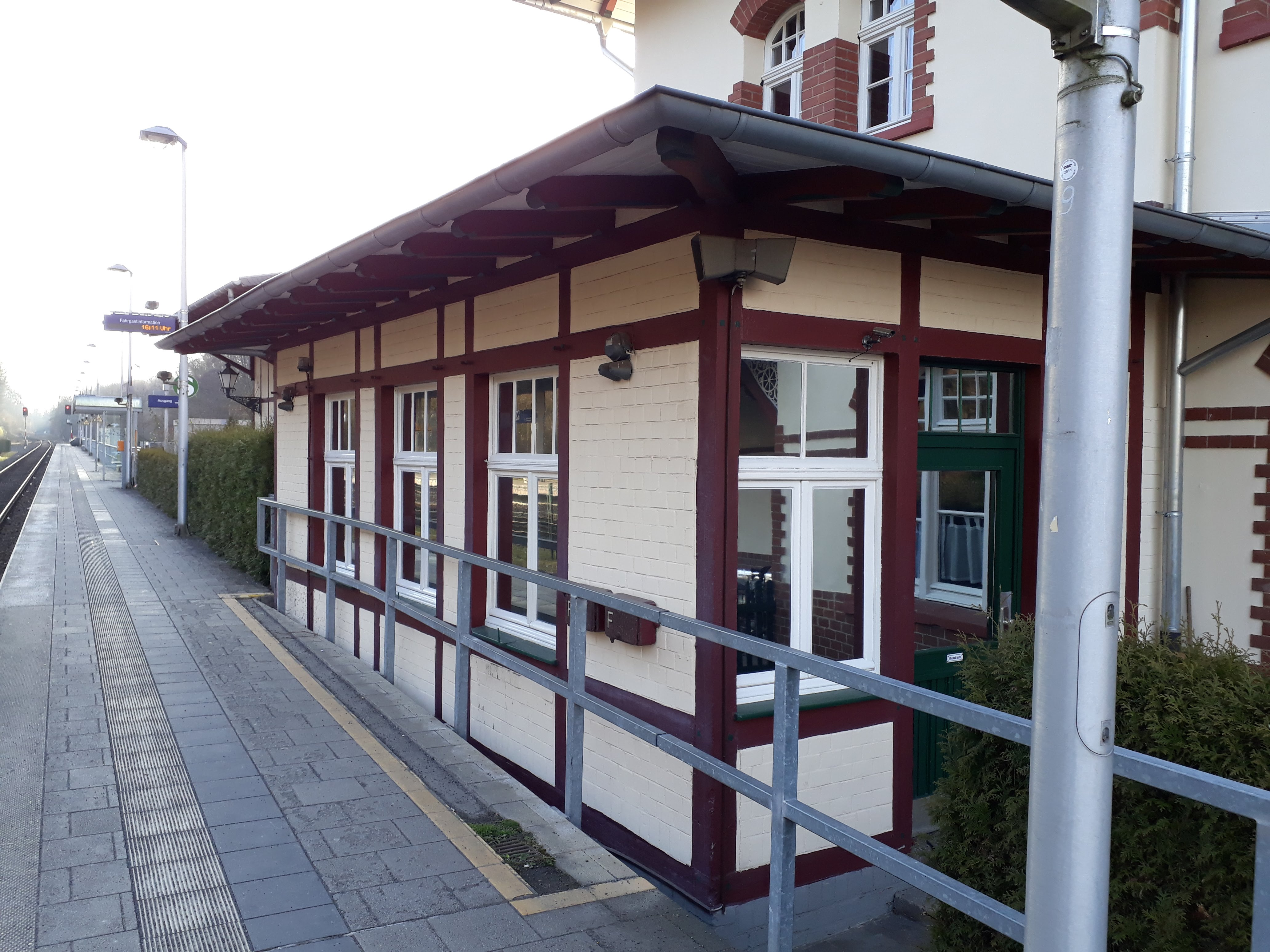 Bahnhof Alfter-Witterschlick: Altes Stellwerk, heute Museum